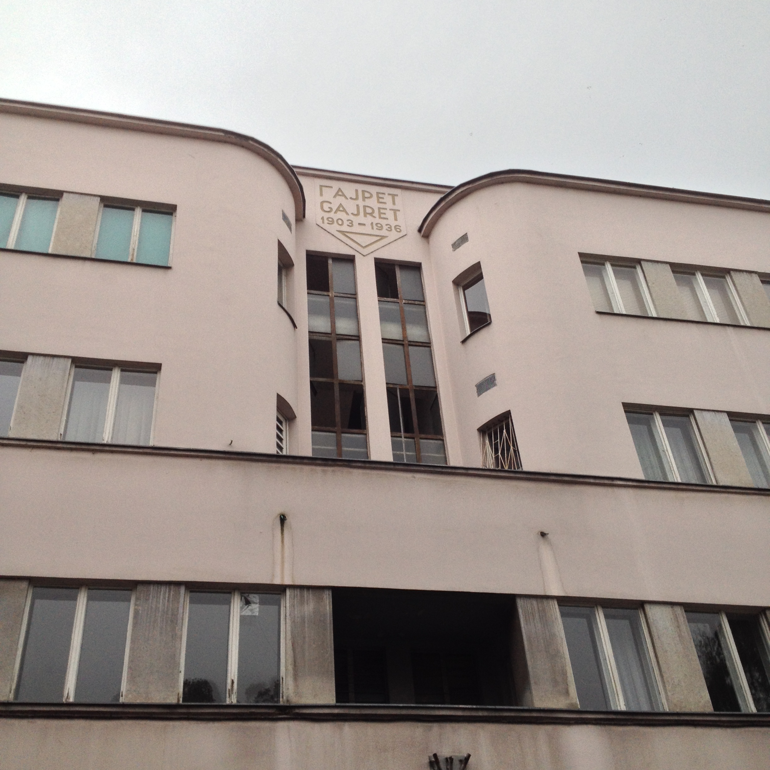 Gajretov dom, Sarajevo, 2015.